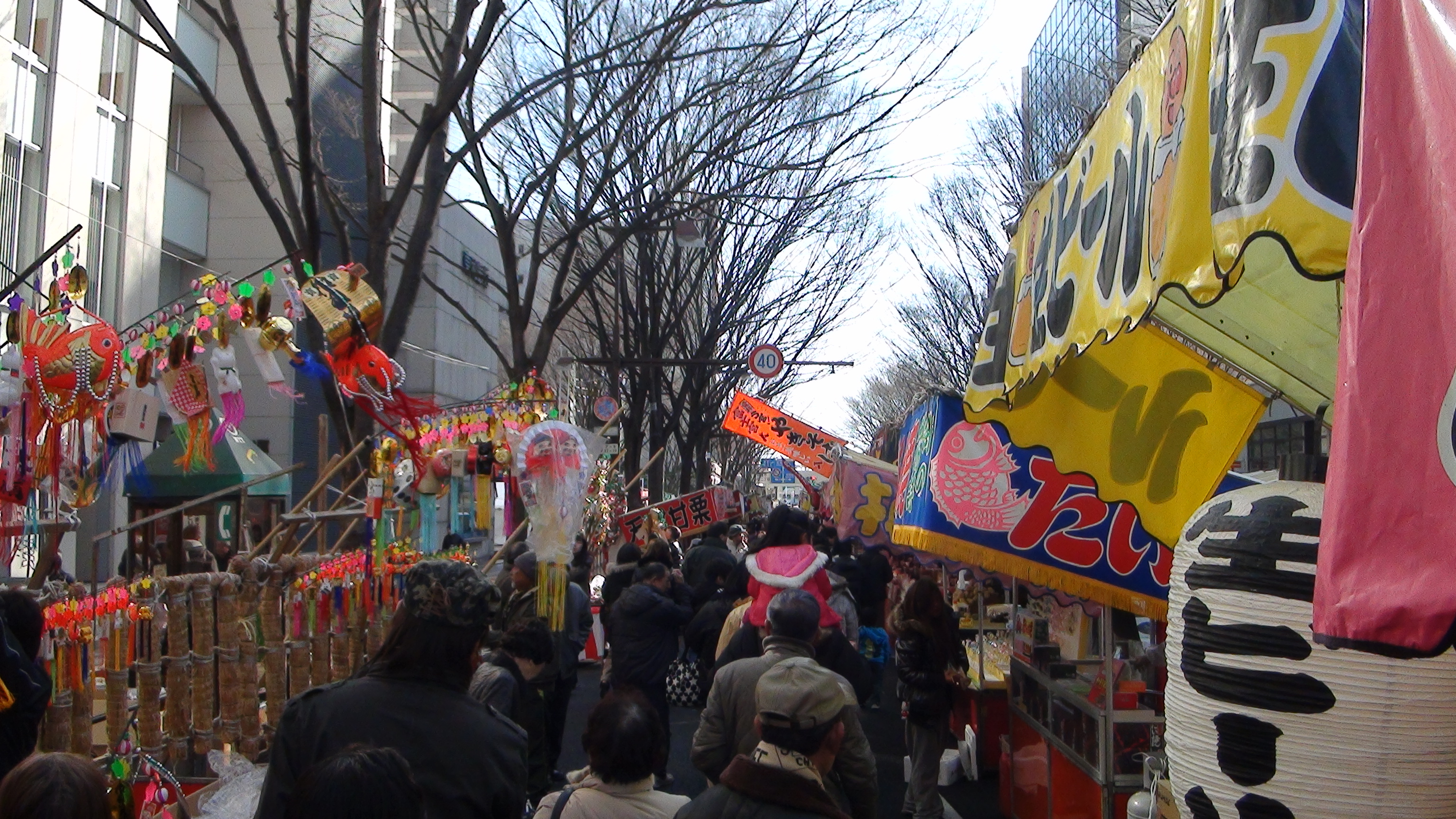 前橋だるま市